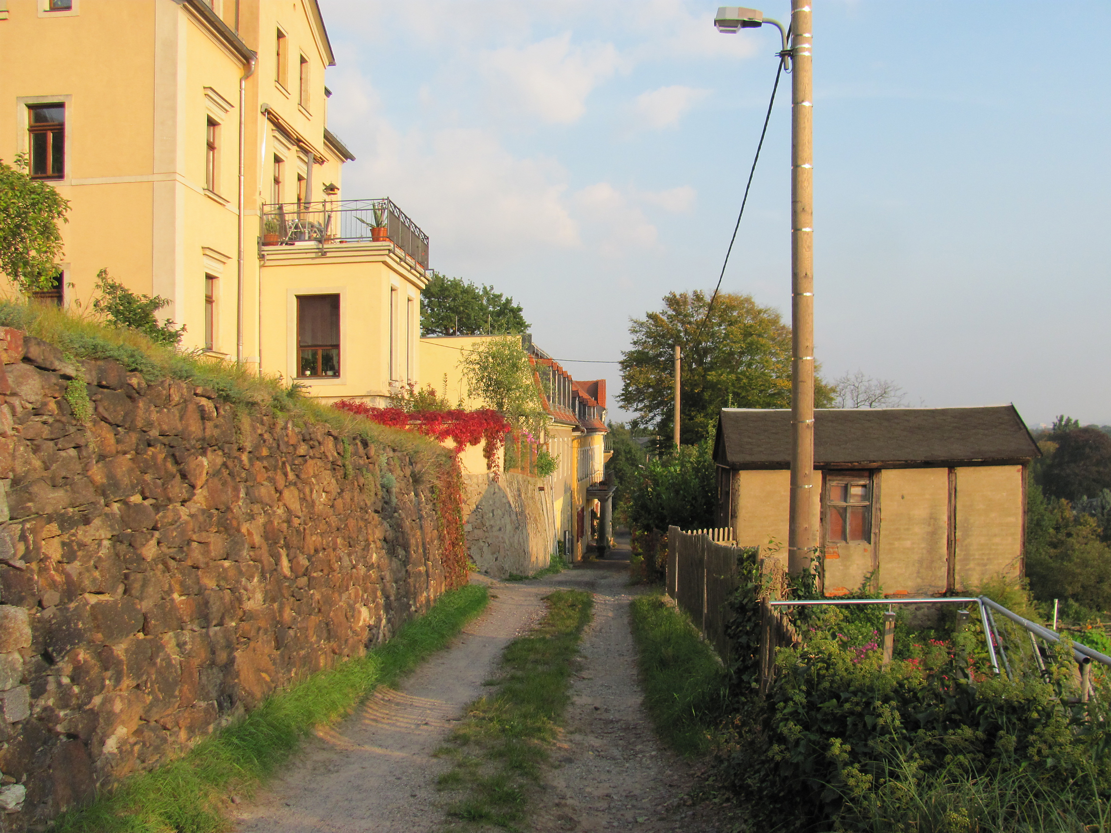 Radebeul-Niederlößnitz, Neufriedstein (Straße) bei Haus 3a, Blick bergab auf das Herrenhaus